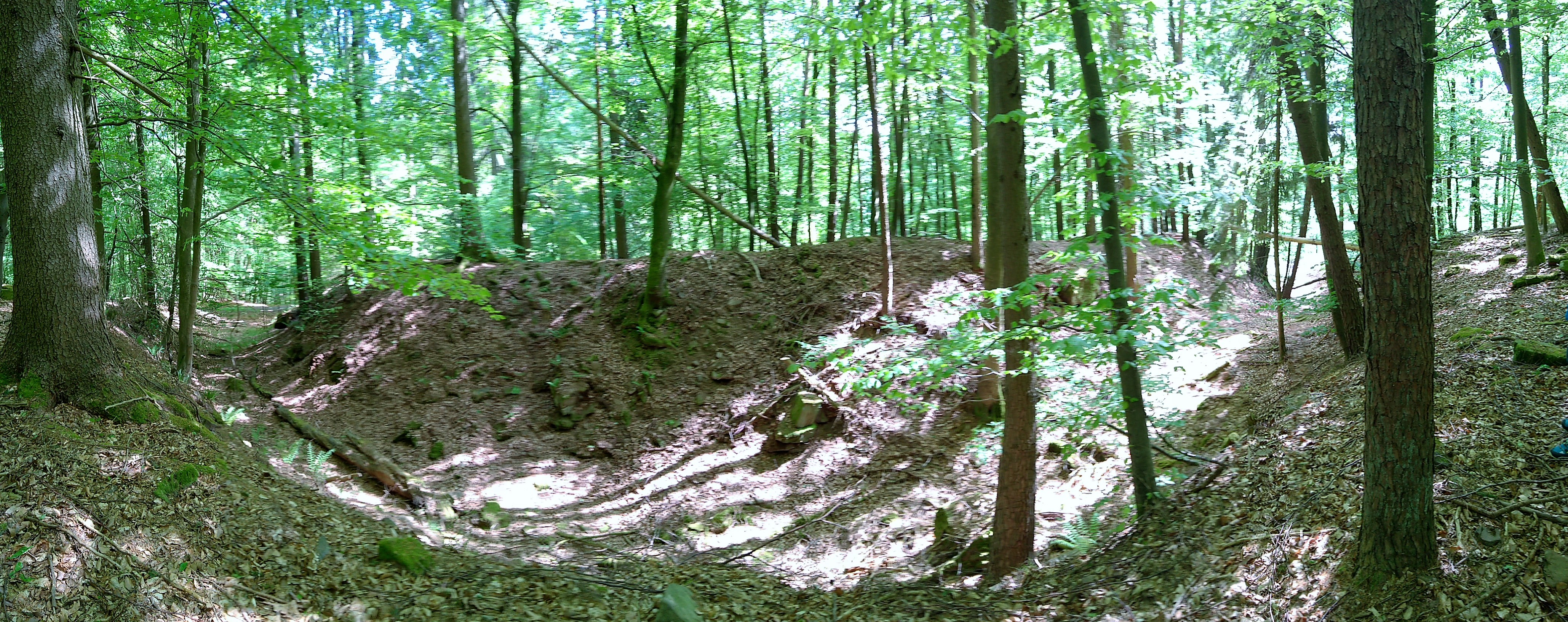 Burgstall Reinstein: Panorama Halsgraben und Burgstall